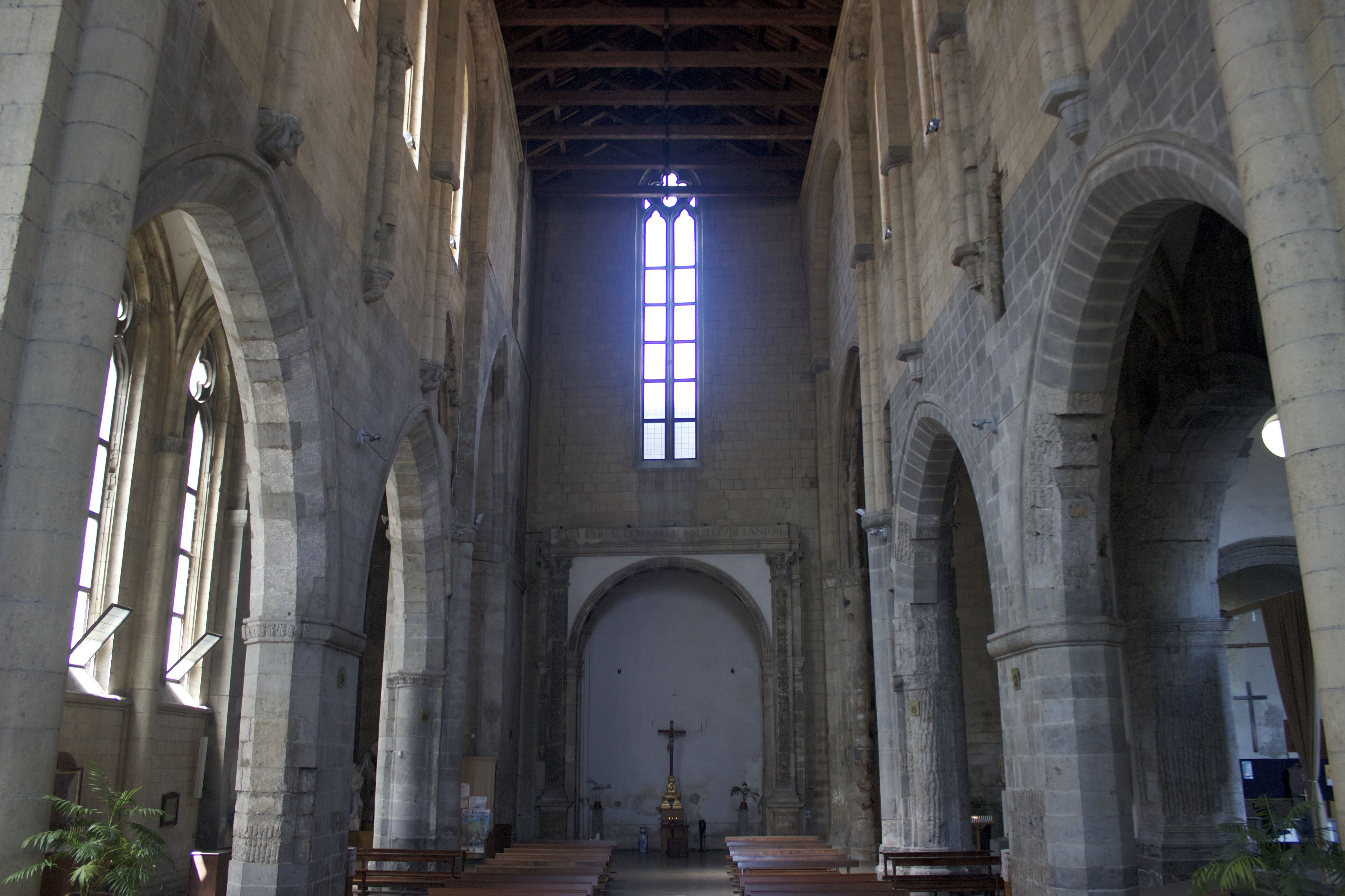 Nápoles. Sant'Eligio Maggiore. Nave hacia los pies